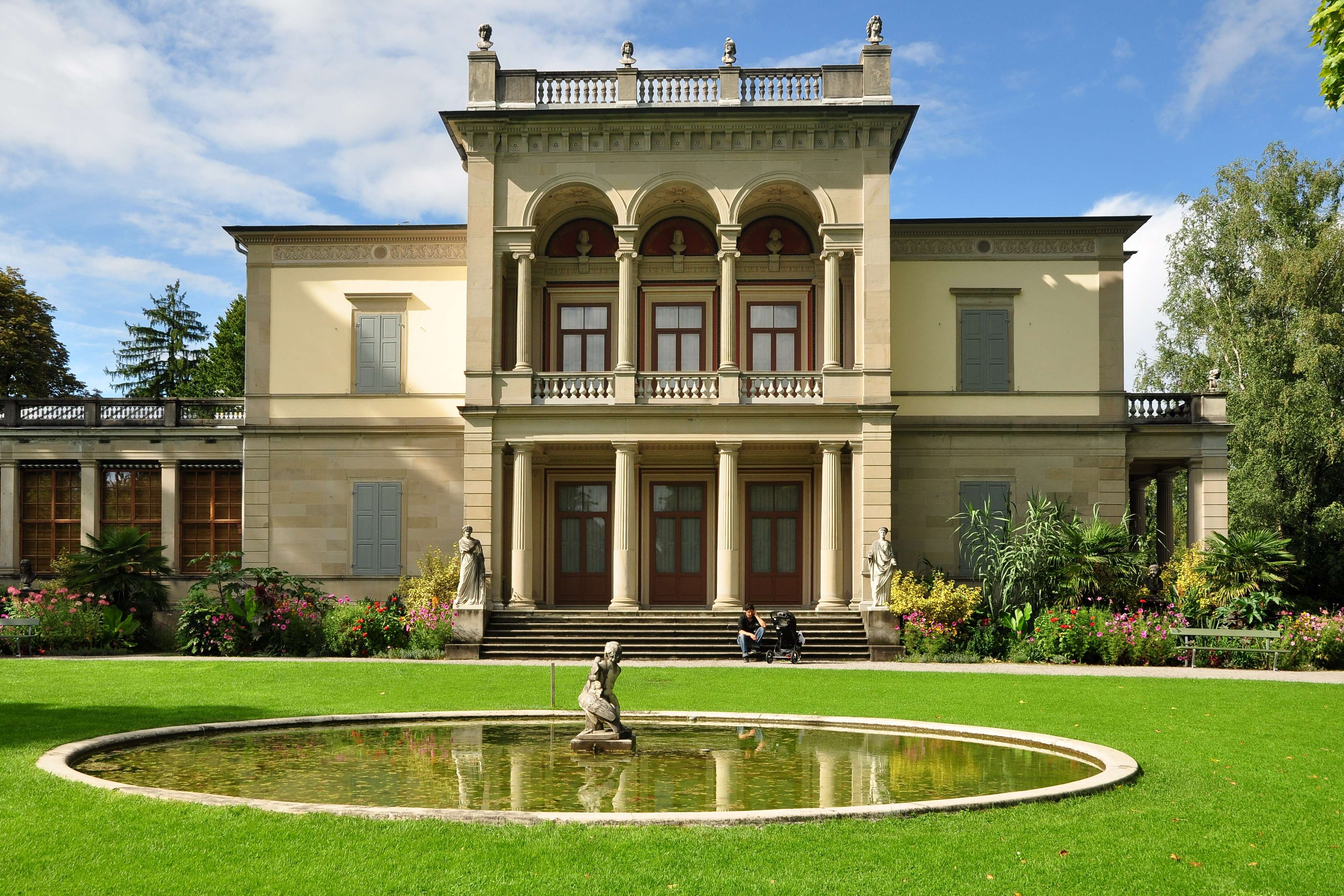 Rieterpark, Villa Wesendonck in Zürich (Switzerland)